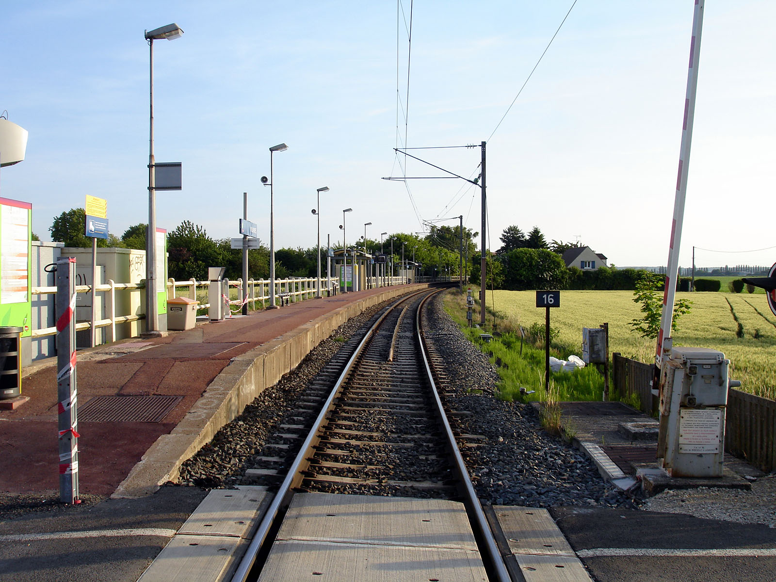 La gare de Villaines, Val-d'Oise, France.